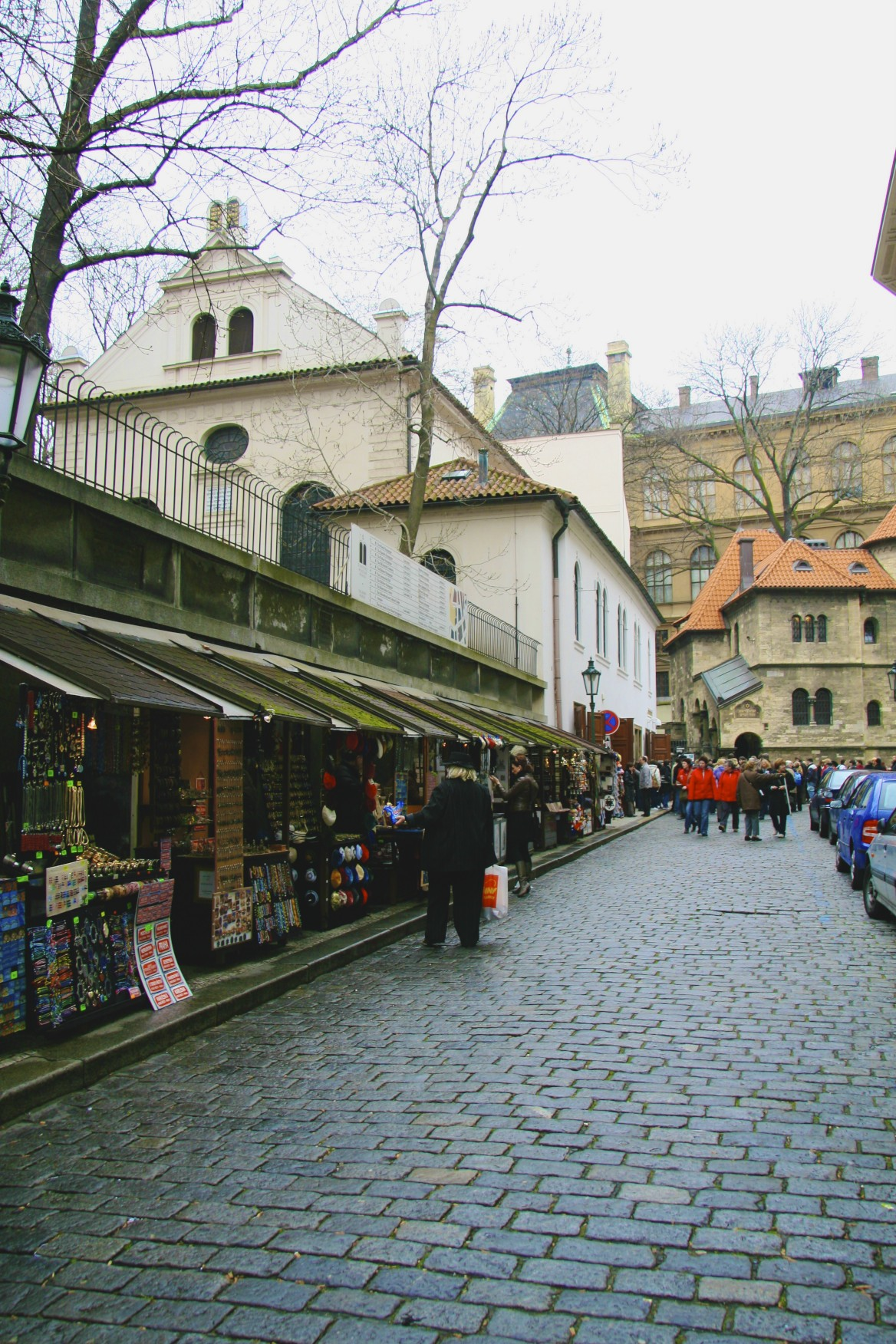 Praha, ulice U Starého hřbitova, vlevo Klausová synagoga, vpravo obřadní síň pohřebního bratrstva